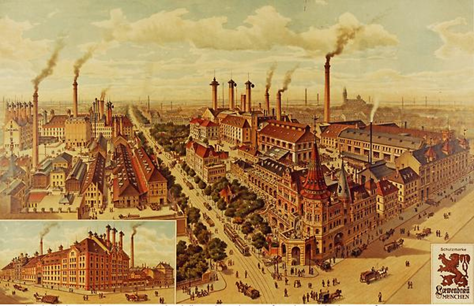 Löwenbräu-Firmengelände 1891